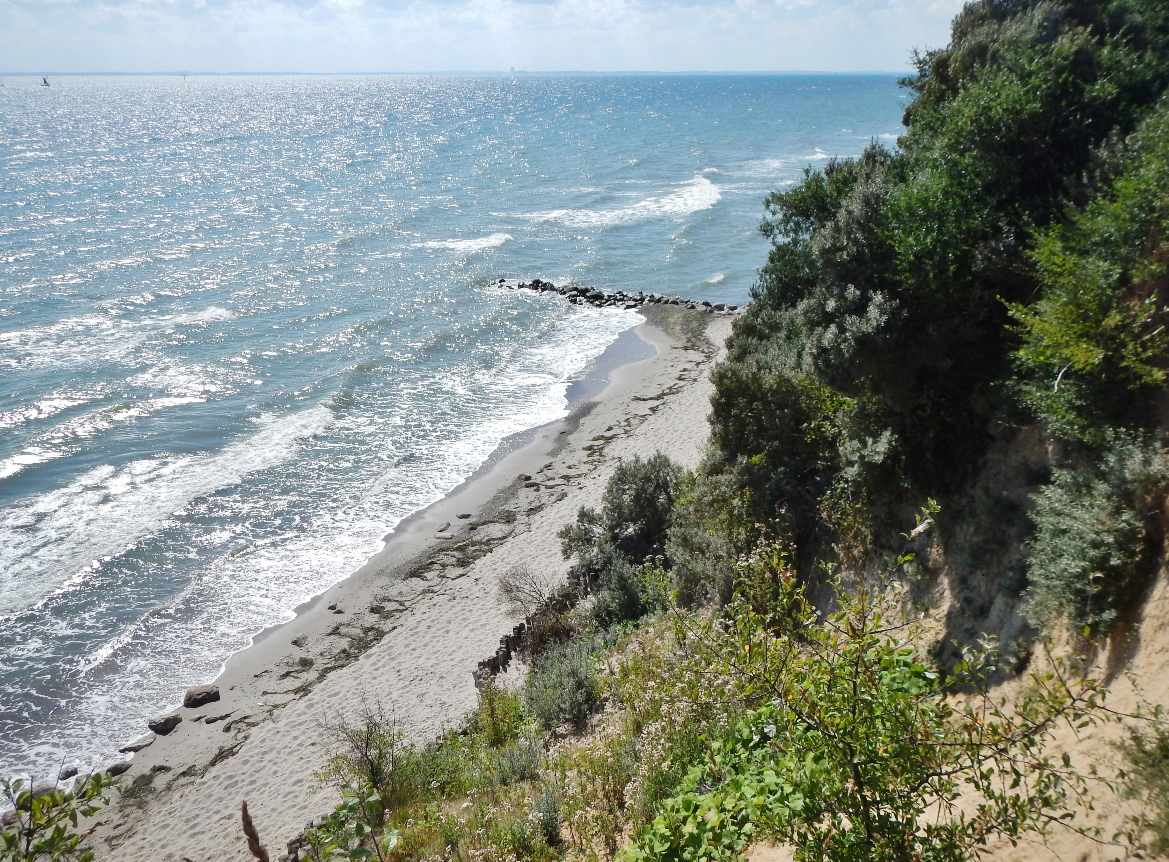 Küste bei Schashagen